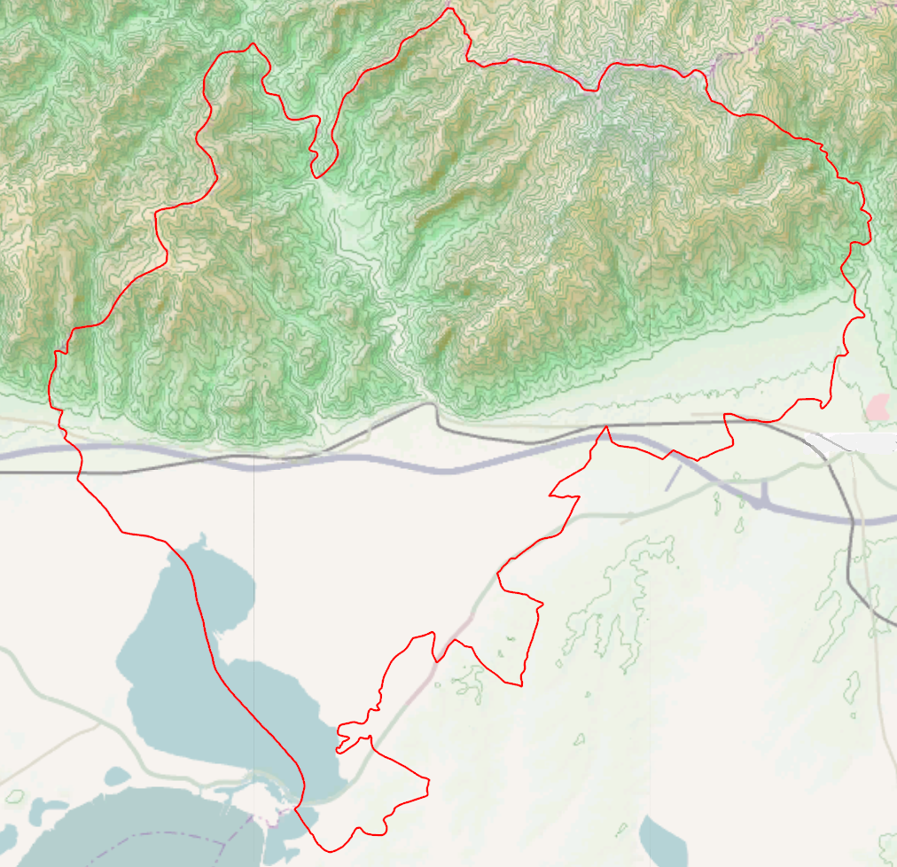 Τοπογραφικός χάρτης του Δήμου Ιάσμου.